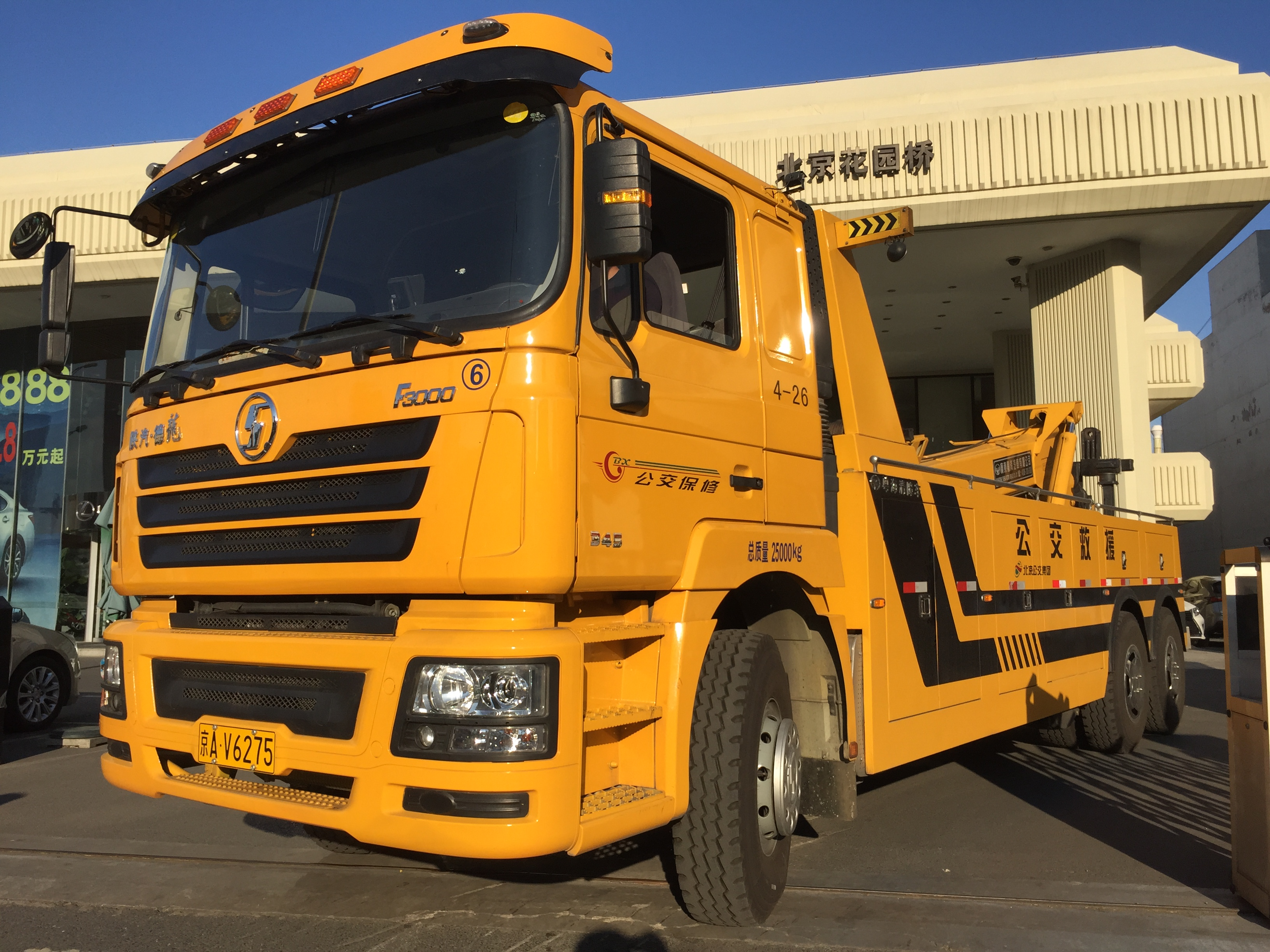 北京公交使用的粤海清障车（陕汽车头）